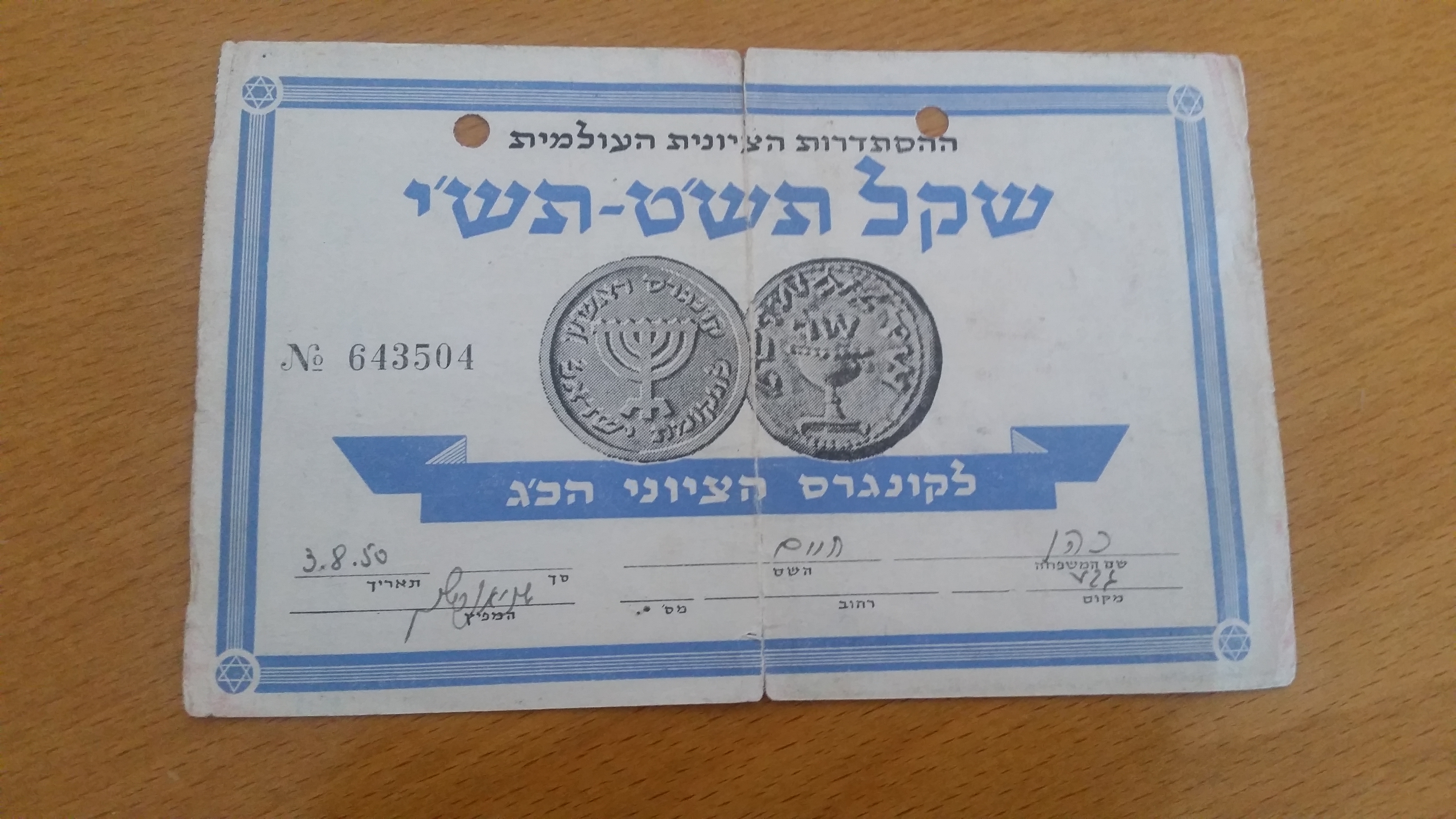 שטר שקילת שקל לקונגרס הציוני הכ"ג (תש"ט-תש"י). השטר שולם בשנת 1950 על ידי קיבוץ גבע, עבור חבר ההכשרה בקיבוץ חיים כהן. בגב השטר נכתב: השקל על ההסתדרות הציונית נמנה כל יהודי המכיר בפרוגרמת בזל: "הציונות שואפת לרכוש מקלט בטוח ע"י משפט גלוי לעם ישראל בארץ ישראל" ושוקל בכל שנה את השקל. (הקונגרס הראשון, 1897) זכות הבחירה לקונגרס ניתנת לכל שוקל שמלאו לו 18 שנה ושקל בכל אחת מהשנים של תקופת הקונגרס הנידונה. (הקונגרס הכ"א, 1939) החברות להסתדרות הציונית מותנית בזיקה לחוקי ההסתדרות ולהחלטות מוסדותיה המנהלים. חובת המשמעת להסתדרות הציונית בכל השאלות הציוניות קודמת לחובת-המשמעת לכל הסתדרות אחרת (הקונגרס הי"ח, 1933) דפוס השילוח ירושלים.